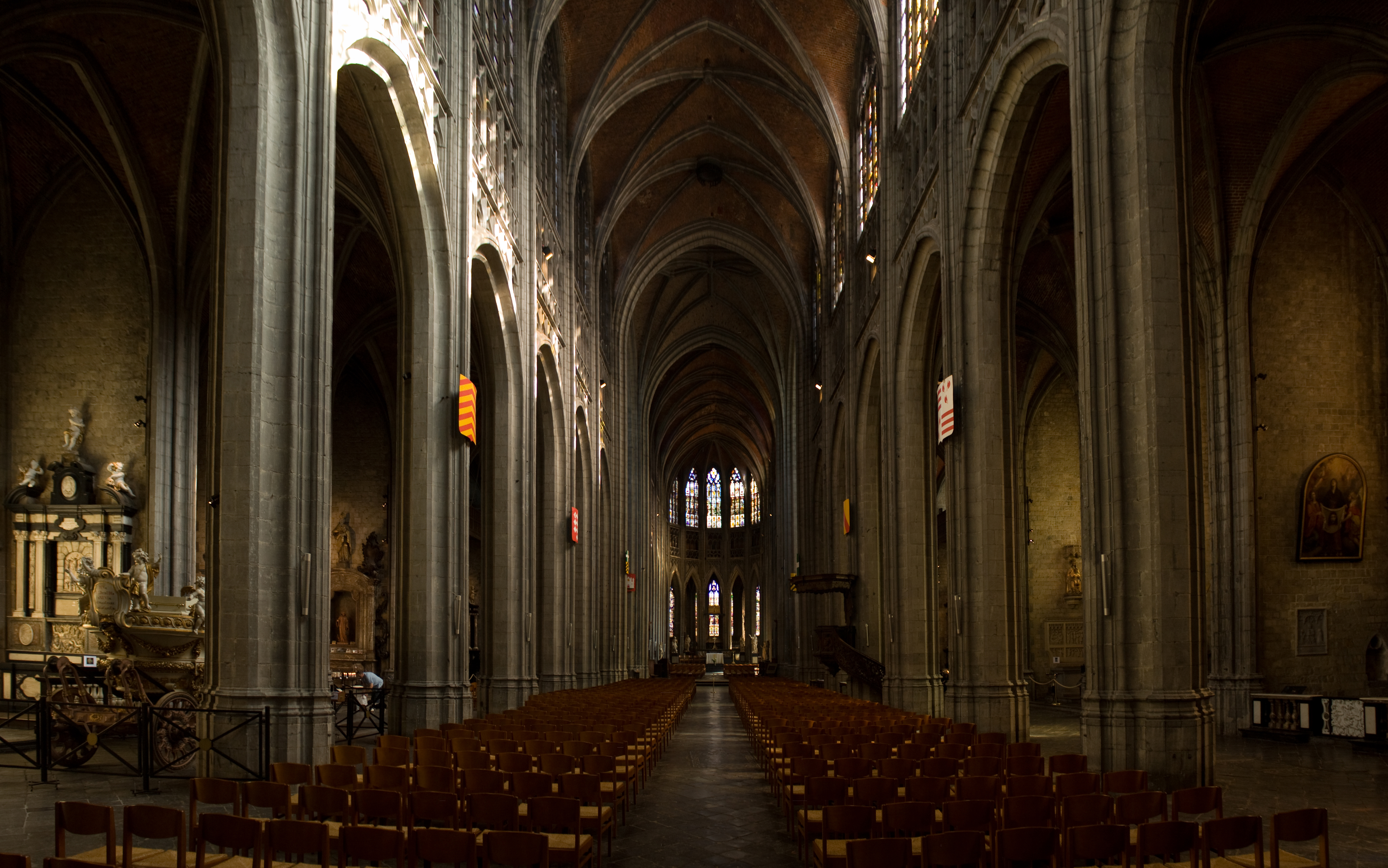 Interieur van de collegiale kerk Sainte-Waudru te Bergen, met zicht op het middenschip